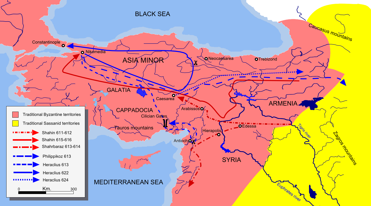 Byzantine-persian campaigns 611-624.